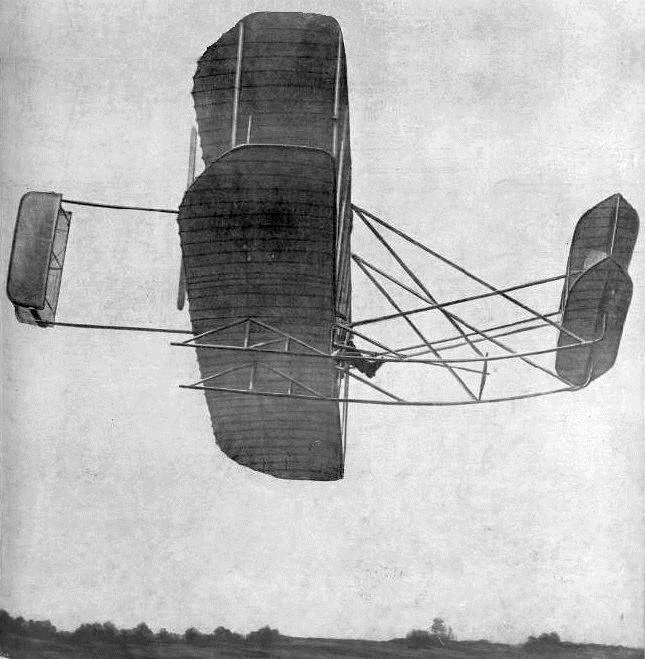 Paul Tissandier le 25 mai 1909 sur Wright Model A, sur les landes de Pont-Long près de Pau (record du monde de vitesse aérienne)